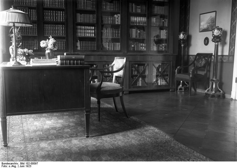 Uebernahme der Villa Rathenaus des ermordeten Aussenministers durch die Reichsregierung als Museum. Das Arbeitszimmer Rathenaus in der Gestalt wie am Tage seiner Ermordung.